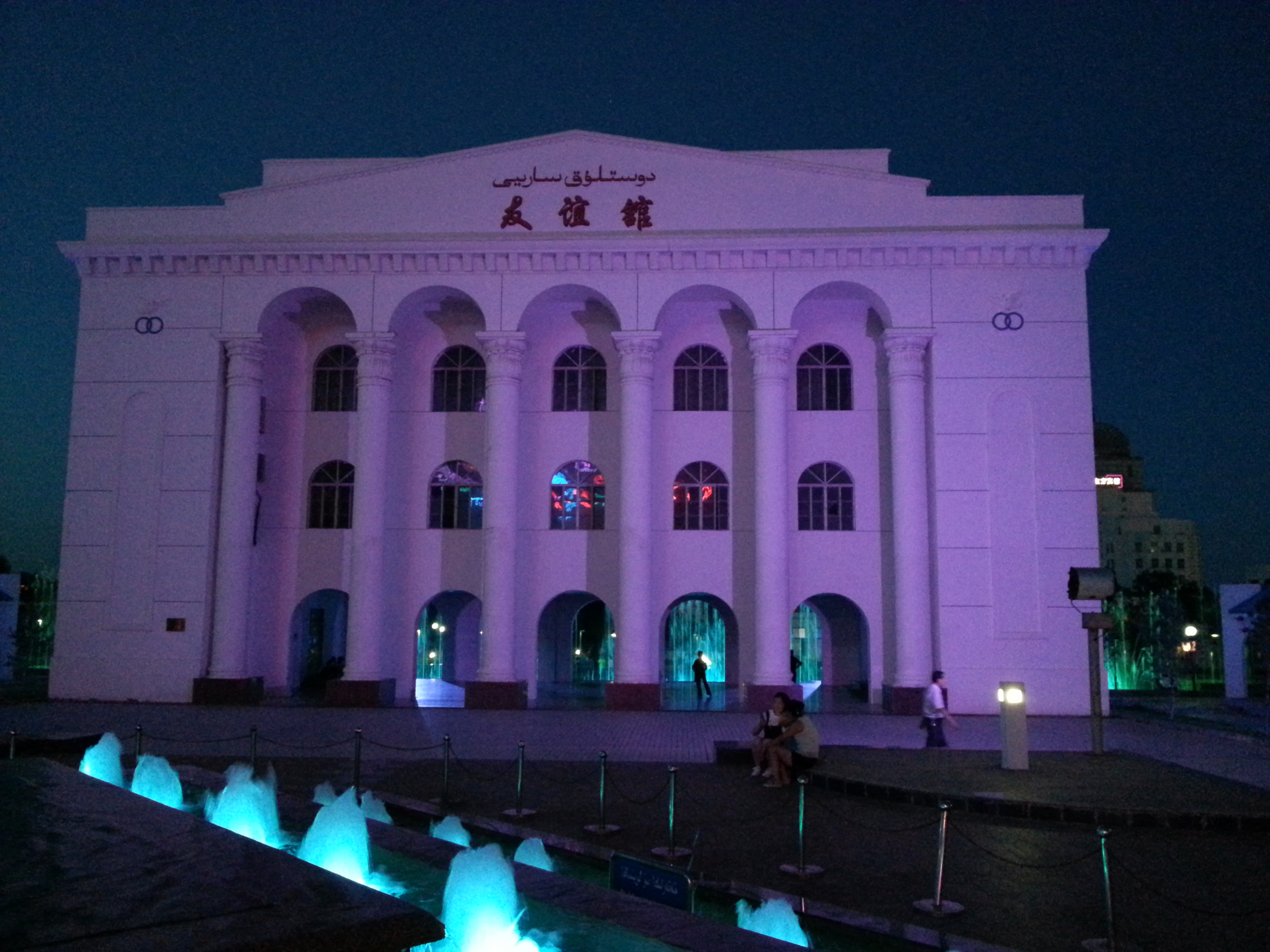 Fasaden til Friendship Theatre i Karamay